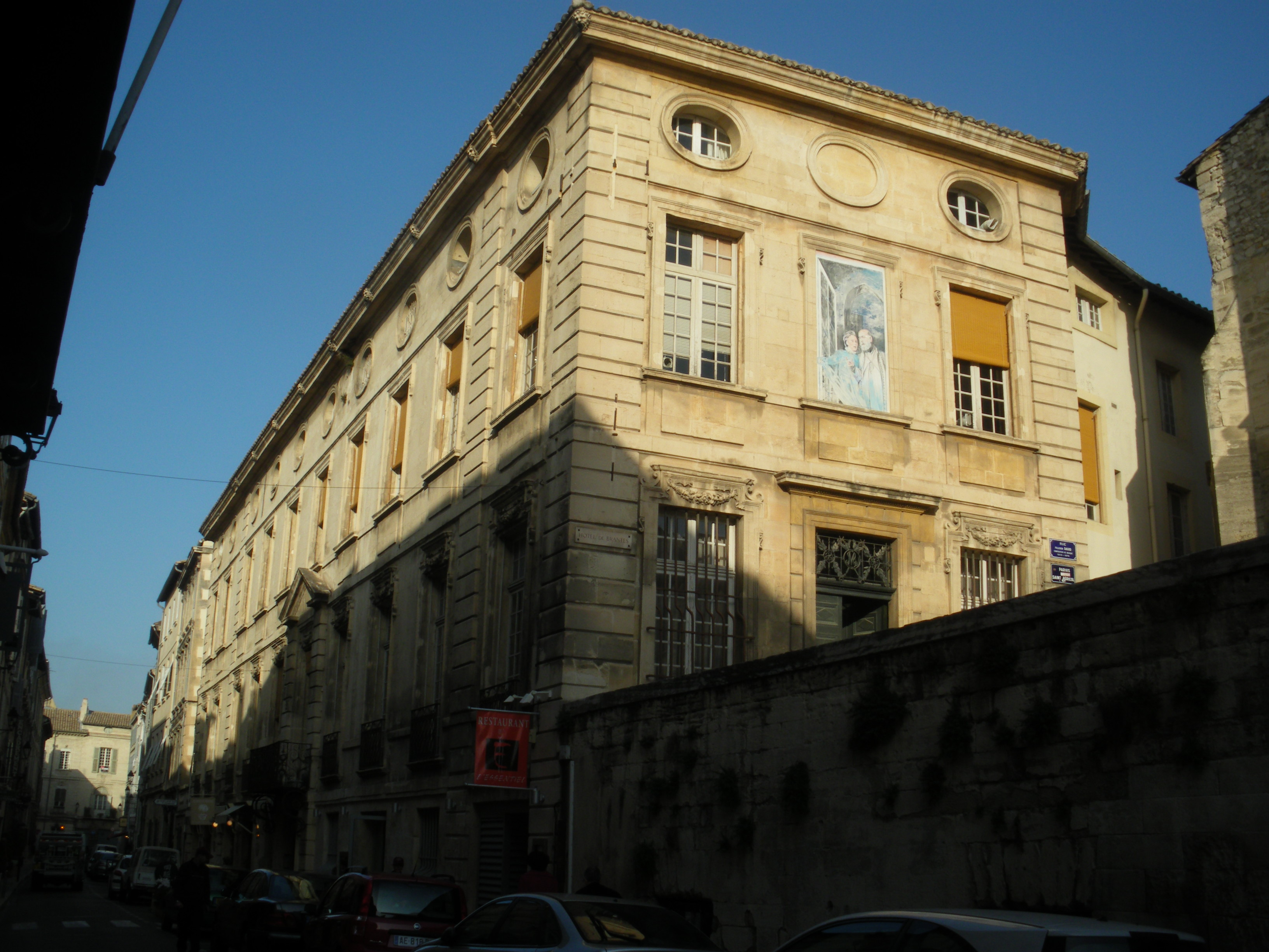 Hotel de Brantes, Avignon